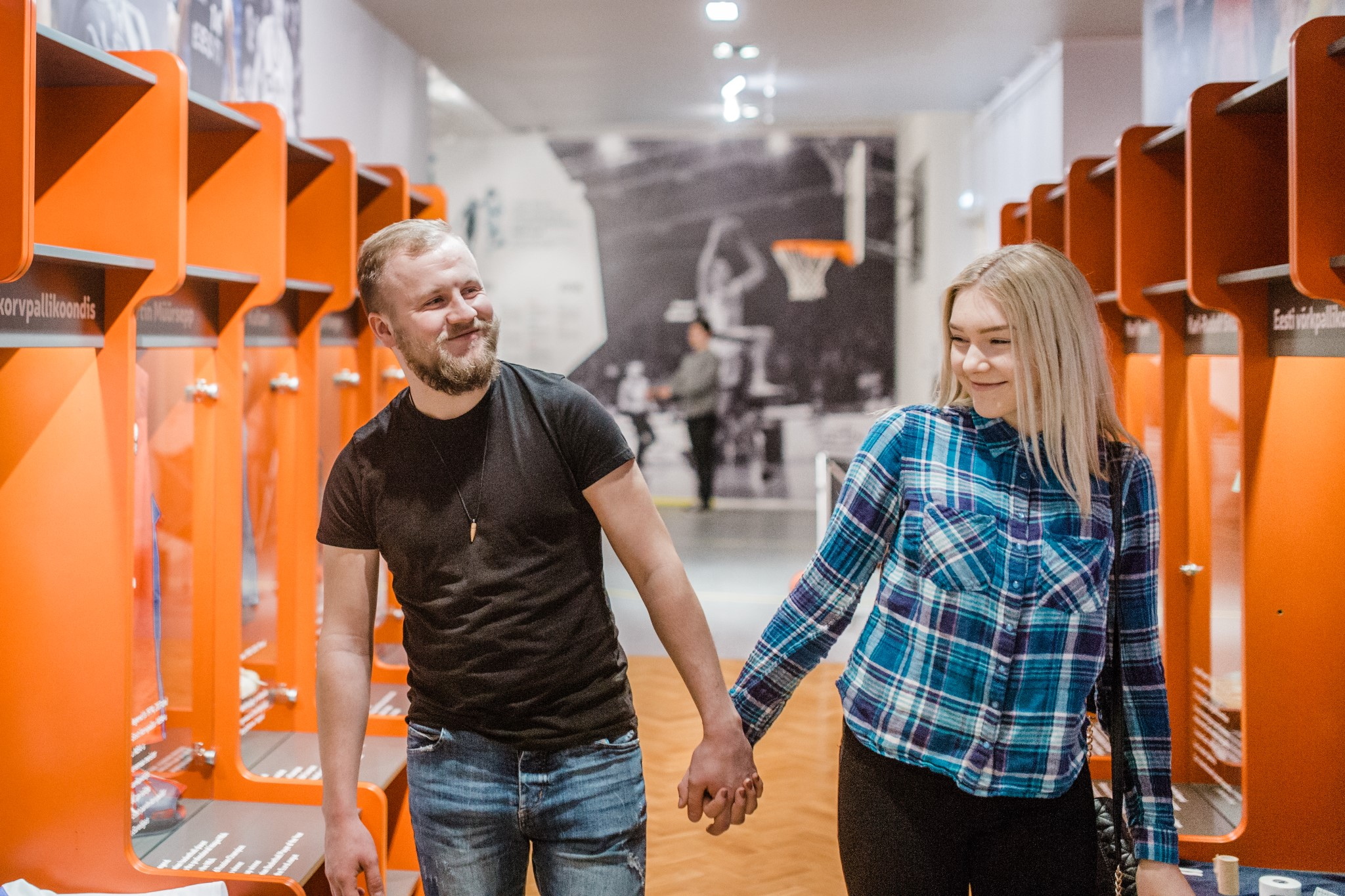 Elamusnäitus "Kõk mängu!"